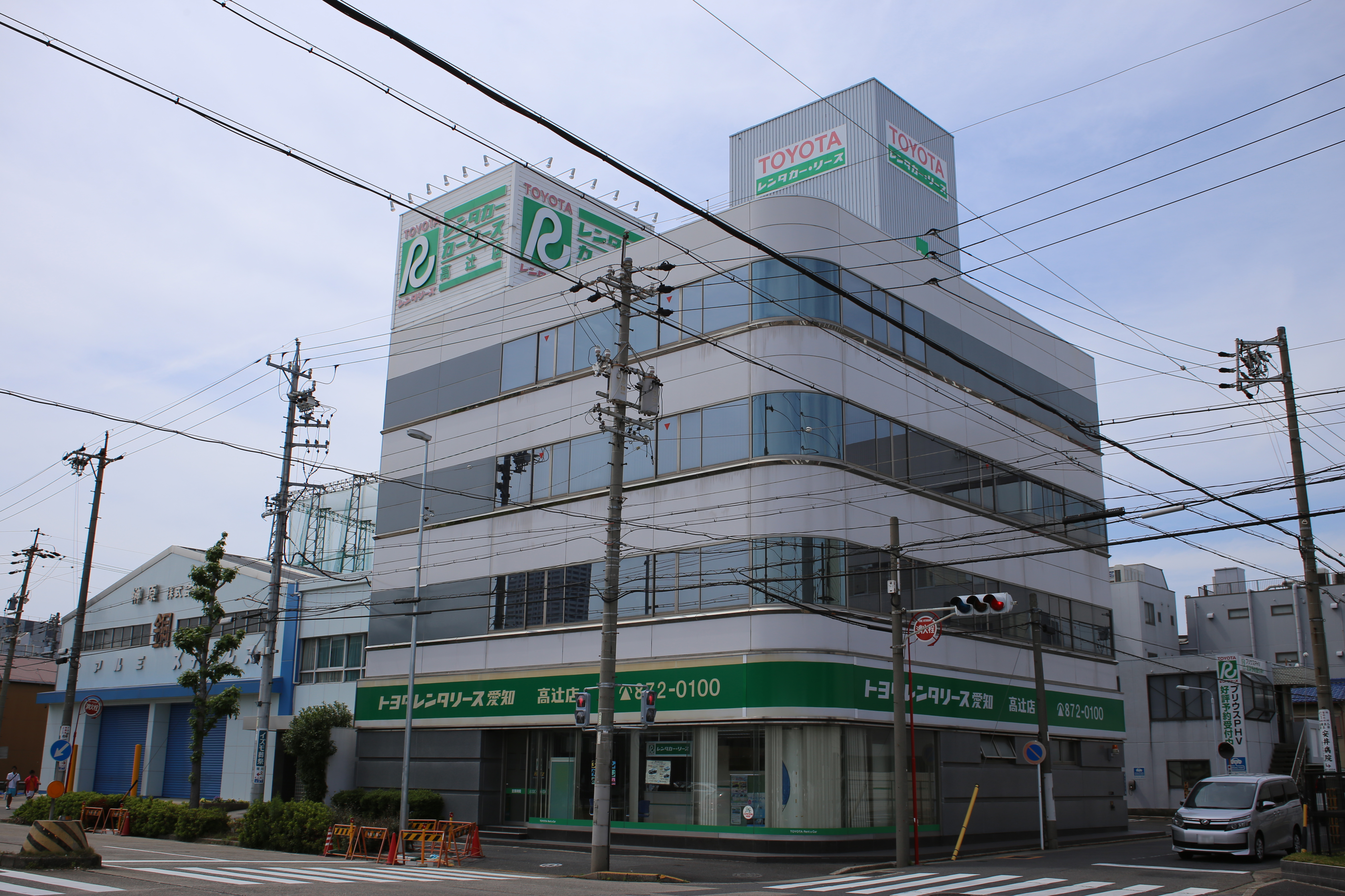 名古屋市昭和区白金三丁目のトヨタレンタリース愛知本社を南側公道東側より撮影。ただし、ナンバープレートにつき画像処理済。